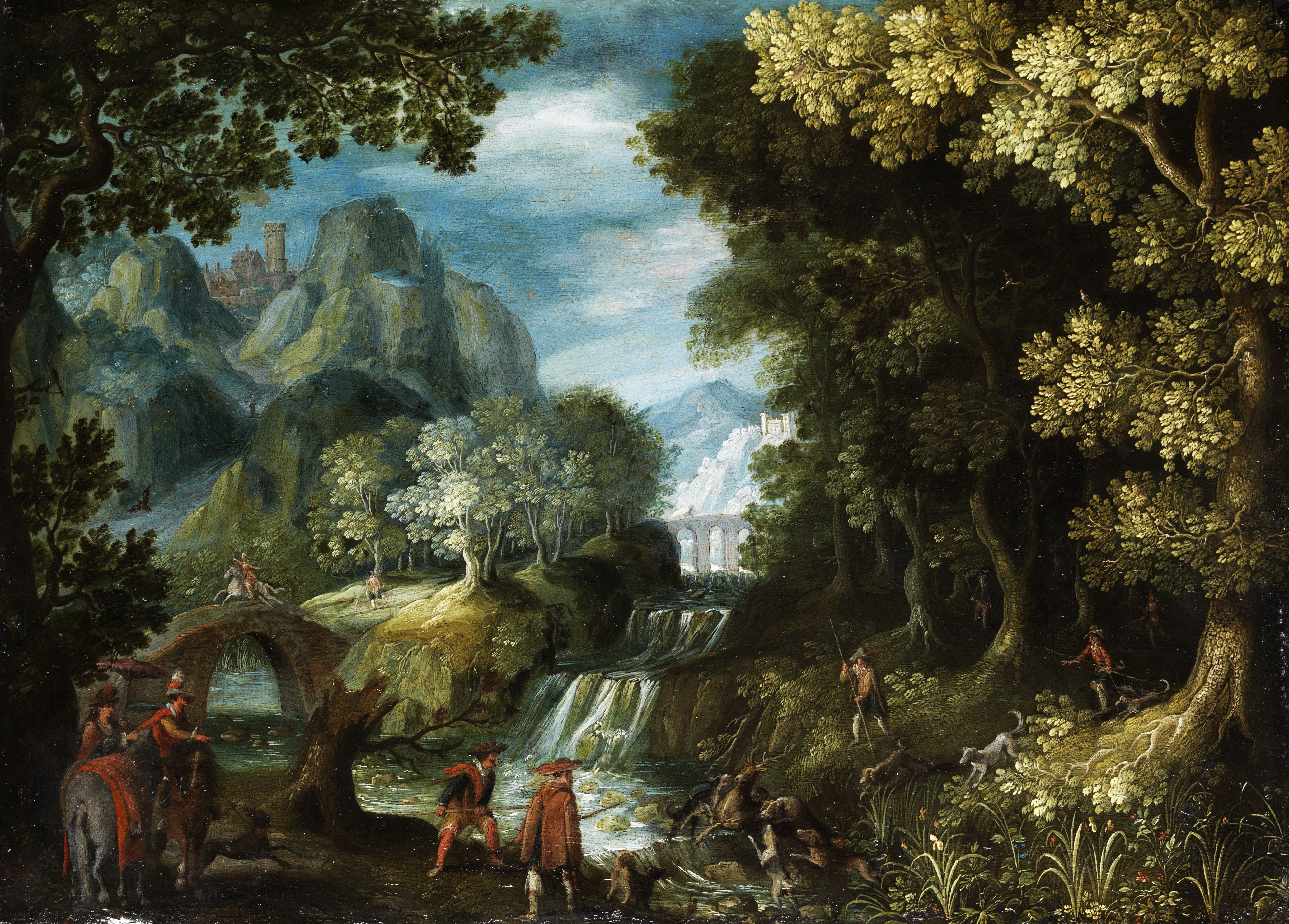 Baumlandschaft mit Kaskaden und Jagdgesellschaft